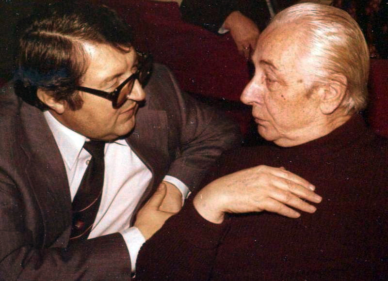 Senator Kern und Bürgerschaftsabgeordneter Friedrich Dethlefs